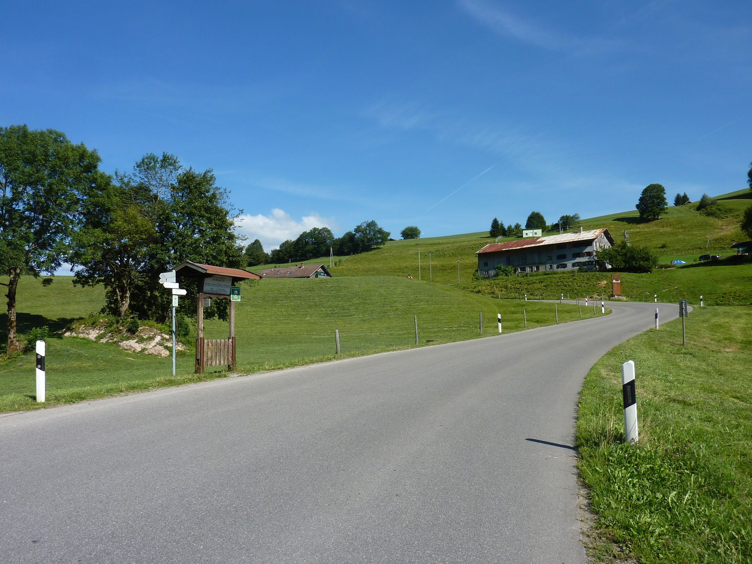 Gunzesrieder Tal